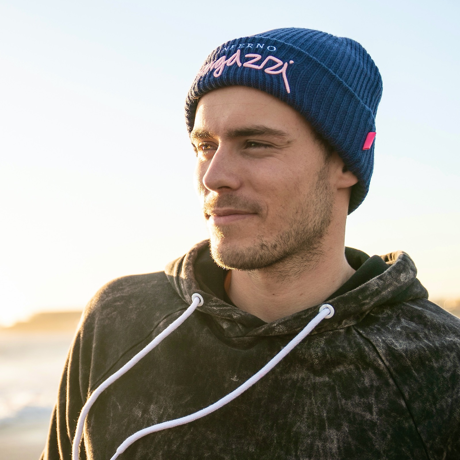 Windsurfer Nico Prien am Strand in der SonneDepicted person: Nico Prien